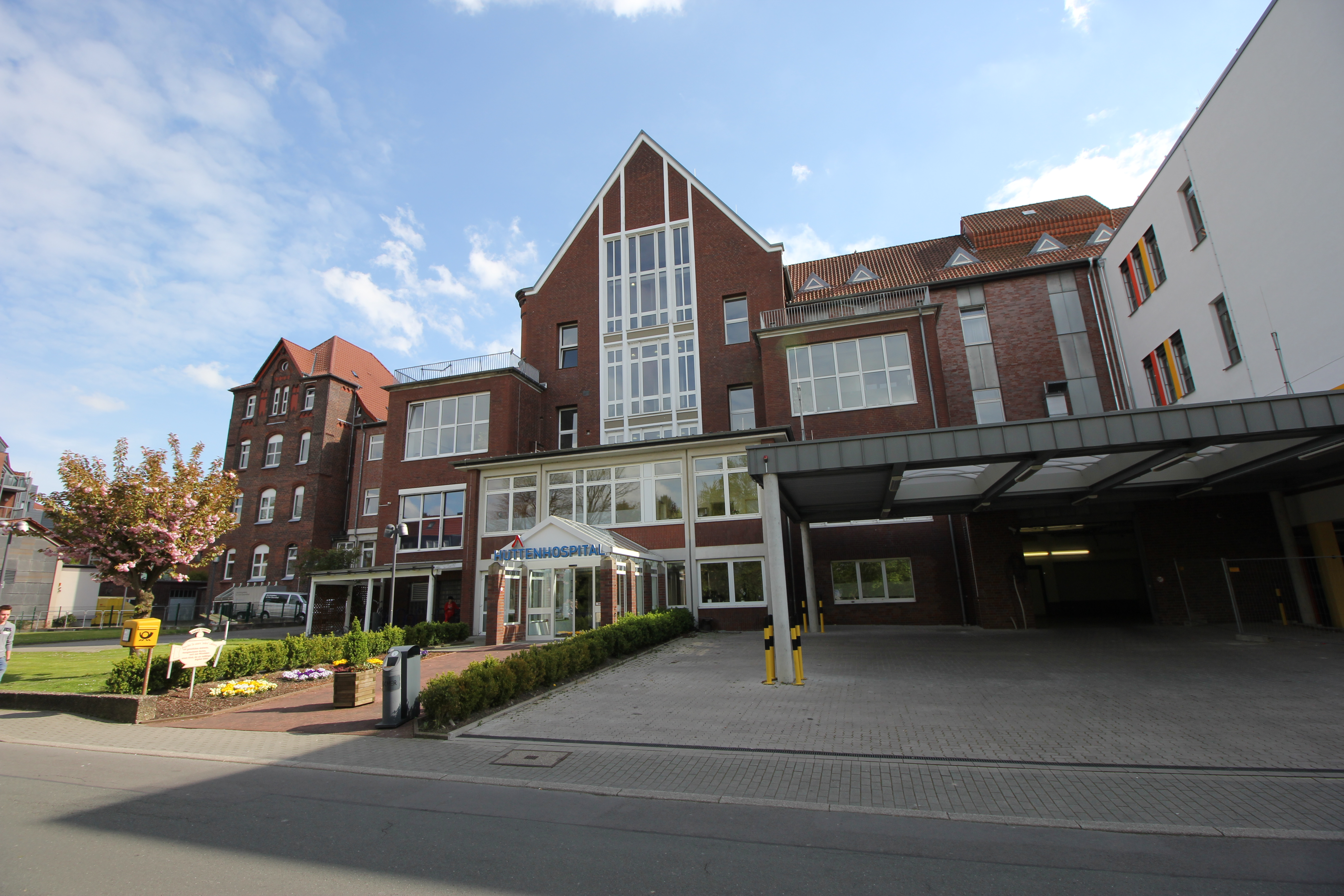 Hüttenhospital in Dortmund-Hörde